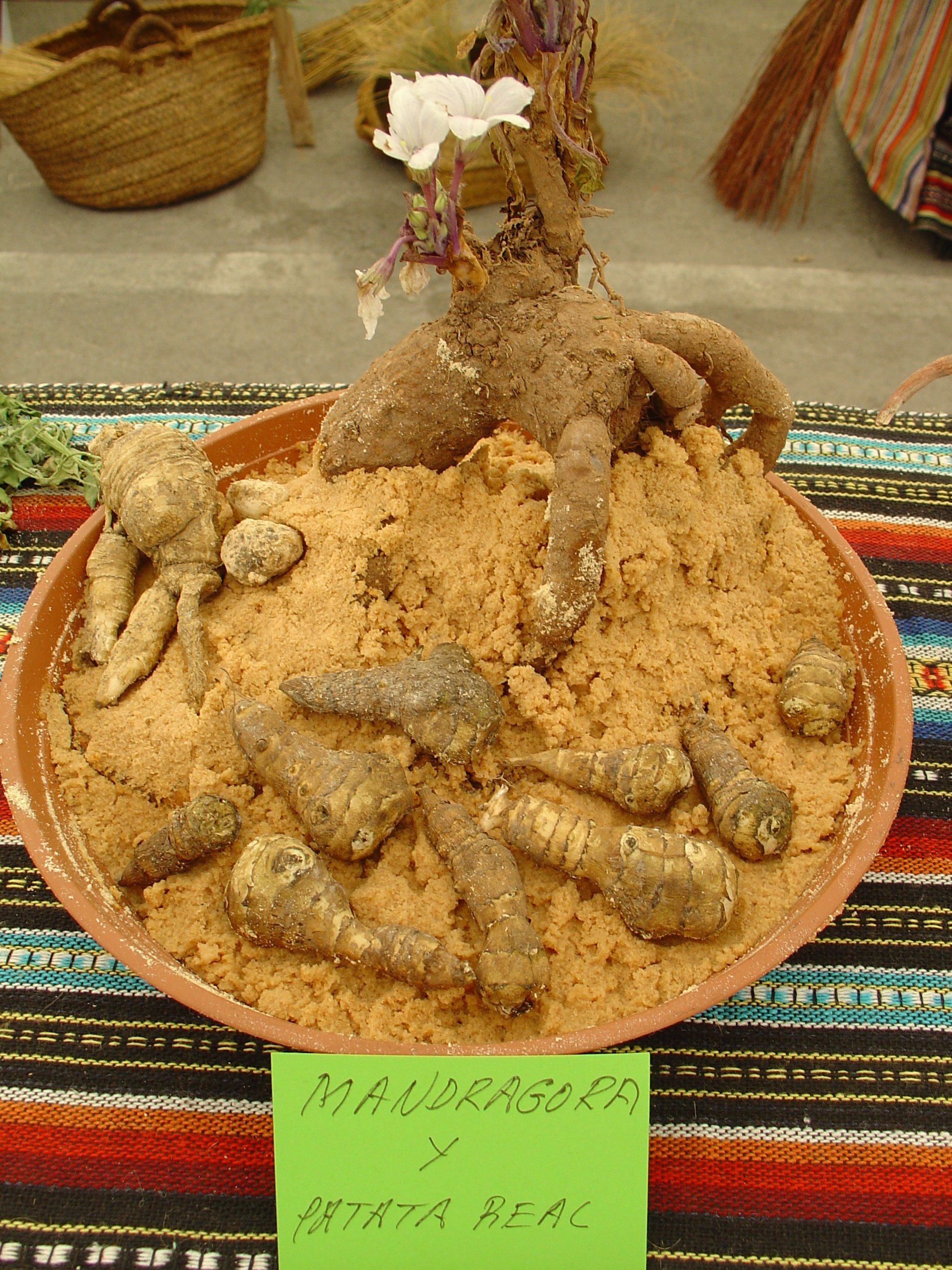 Mandragora y patata real